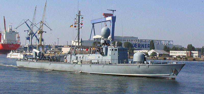 Beschreibung: Schnellboot P6121 S71 Gepard / Typ 143A Gepard-Klasse Fotograf: Darkone, 9. August 2003